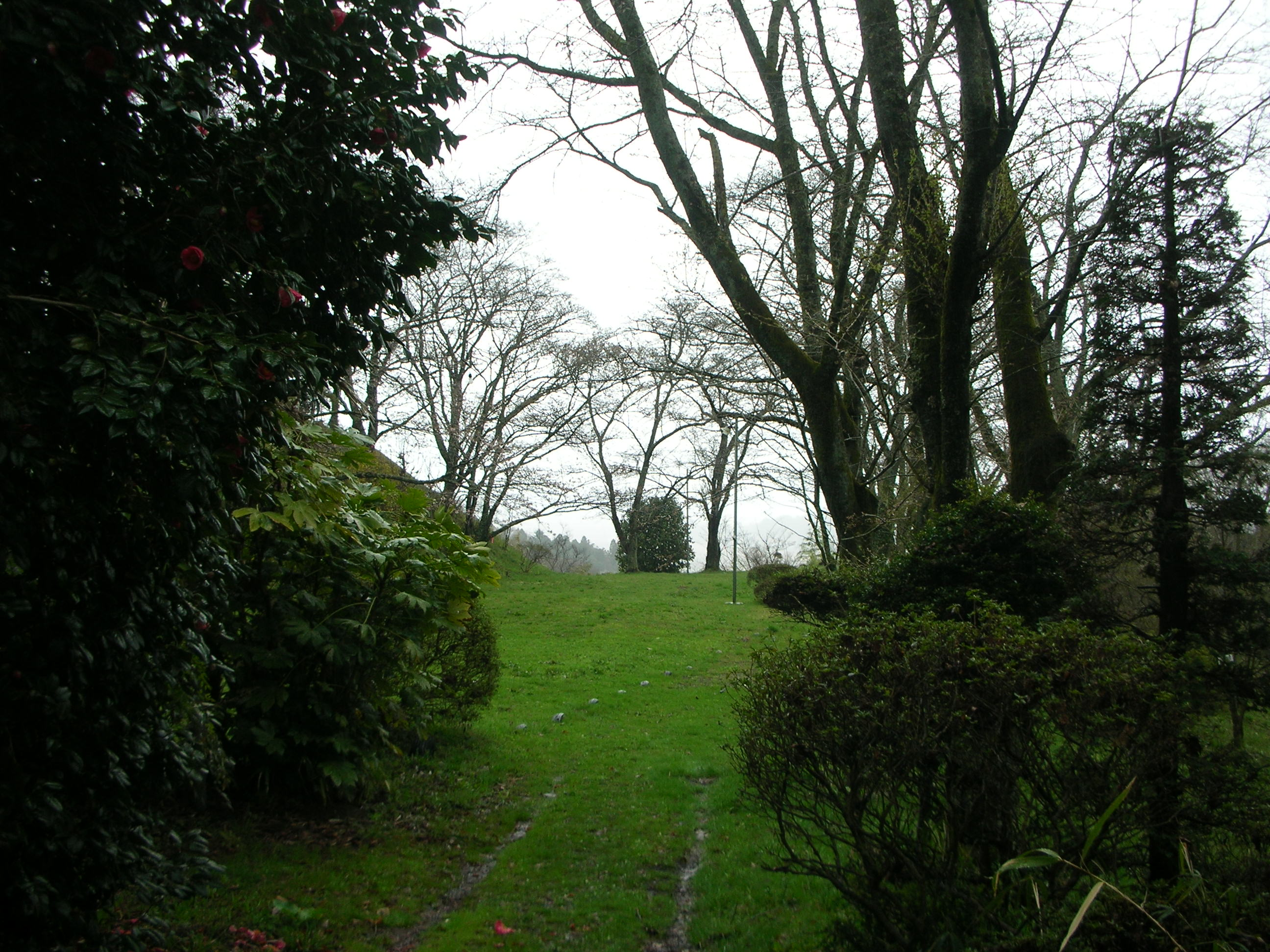 大窪城址公園